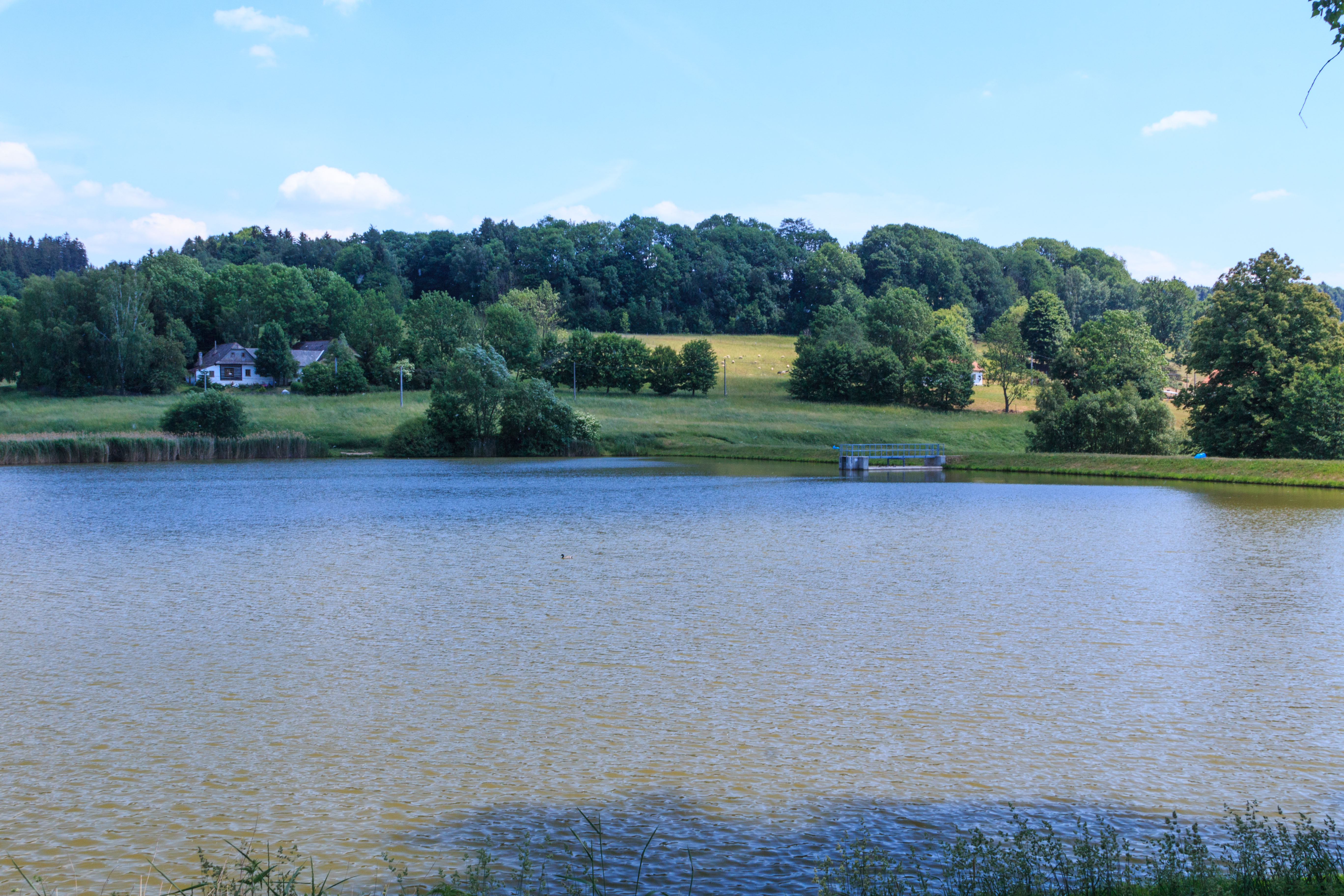 Velký Stašovský rybník Project: Vodstvo.